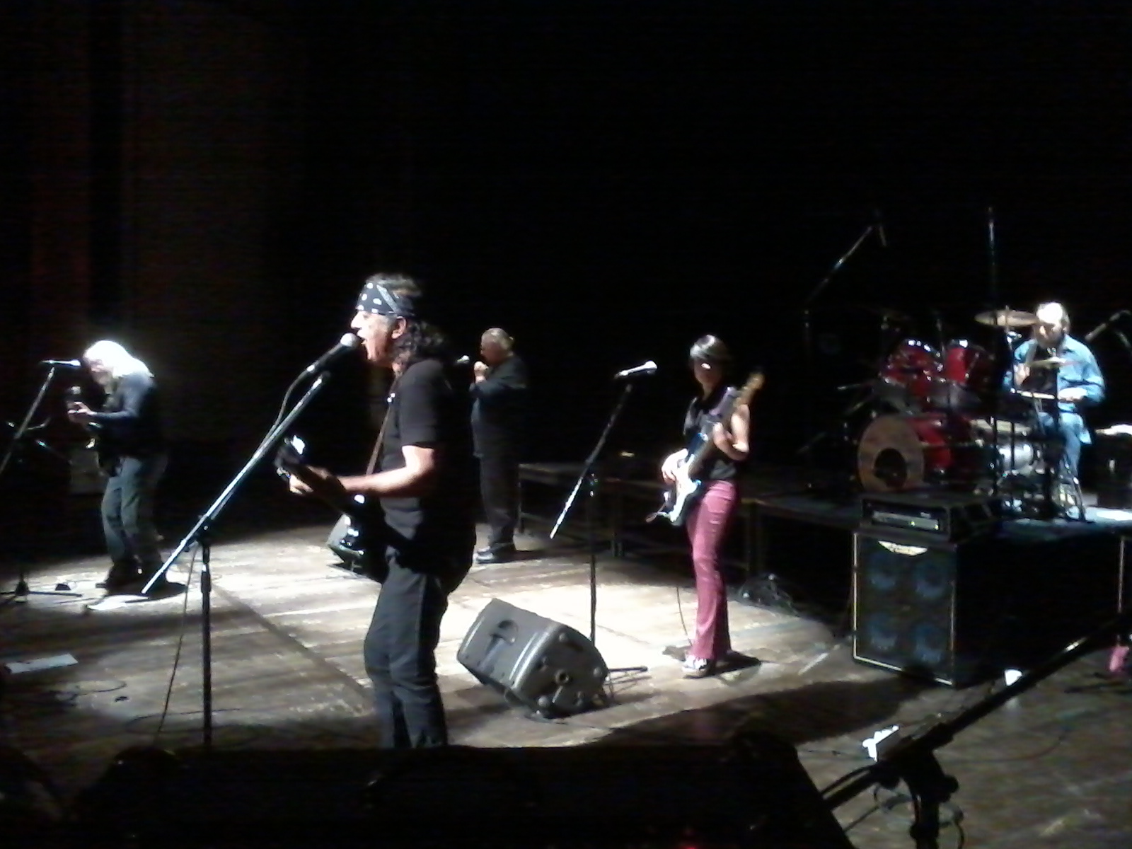 Los Alfajores de la Pampa Seca en vivo.